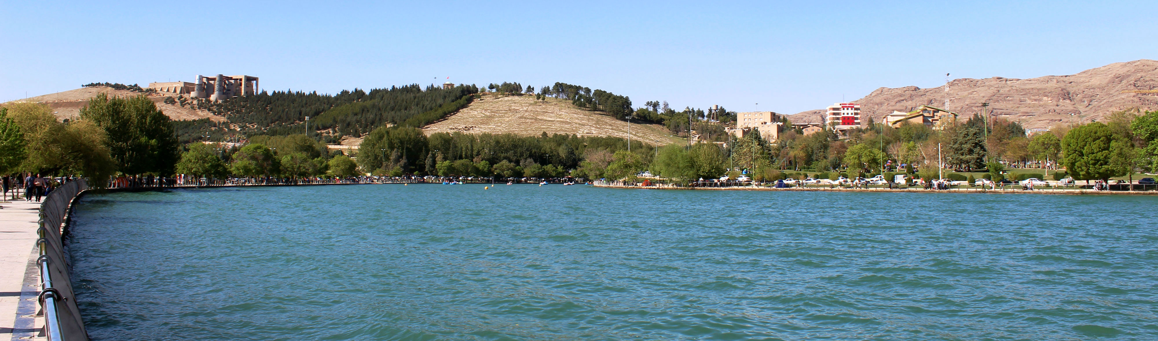 دریاچه کیو خرم آباد